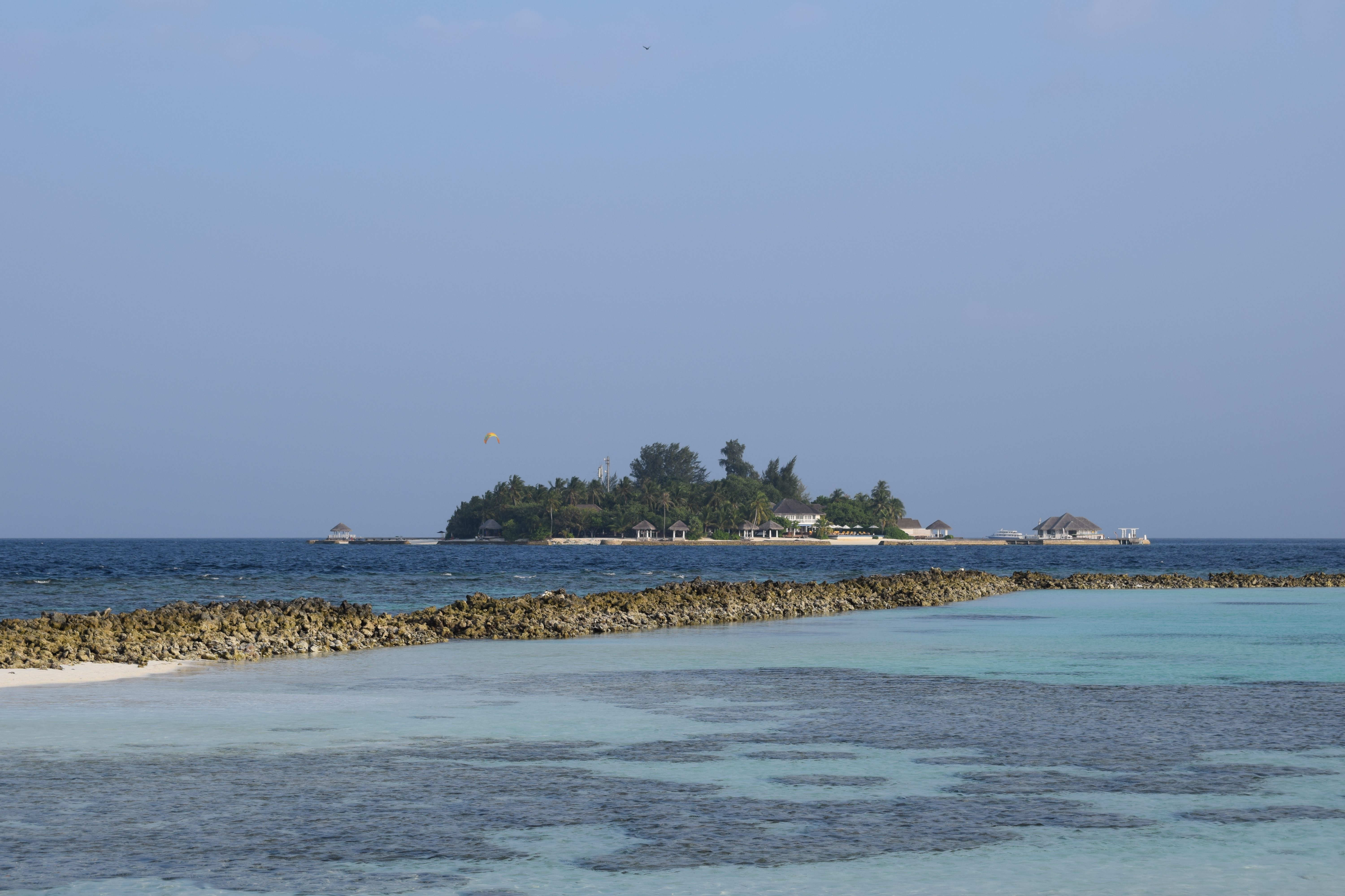 Kudarah seen from Vakarufalhi